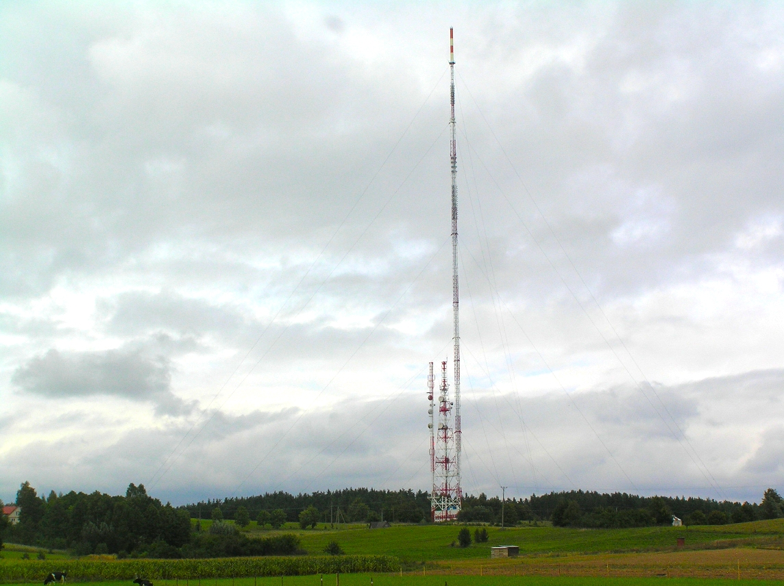 Zdjęcie masztu w Krynicach, koło Białegostoku.